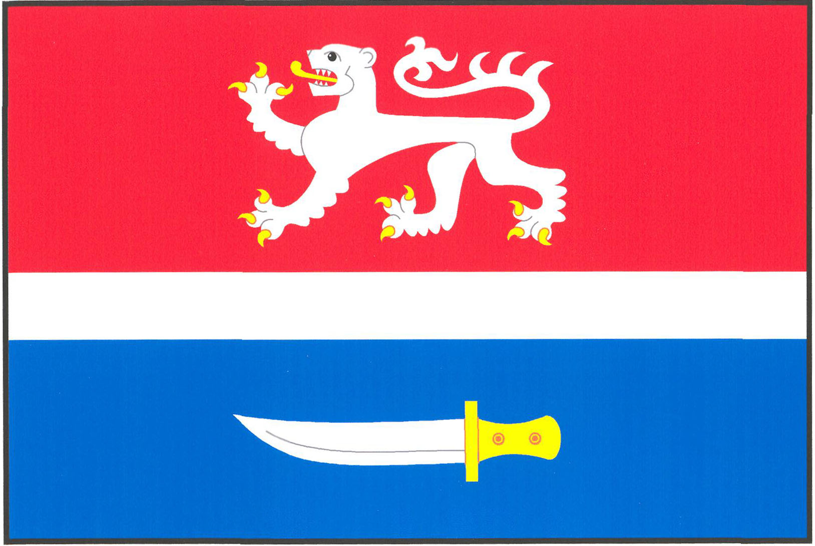 Vlajka obce Hrdlořezy (okres Mladá Boleslav)